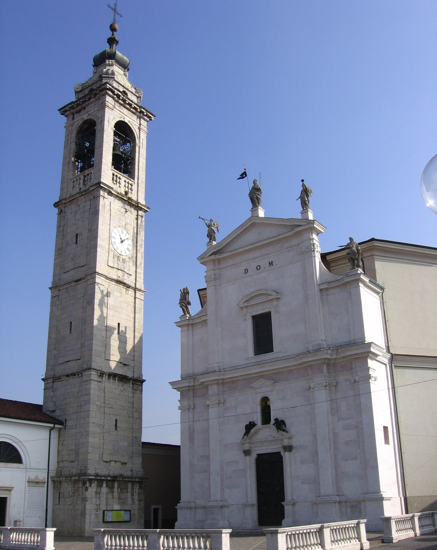 Parrocchia di Gorlago, Bergamo, Italia